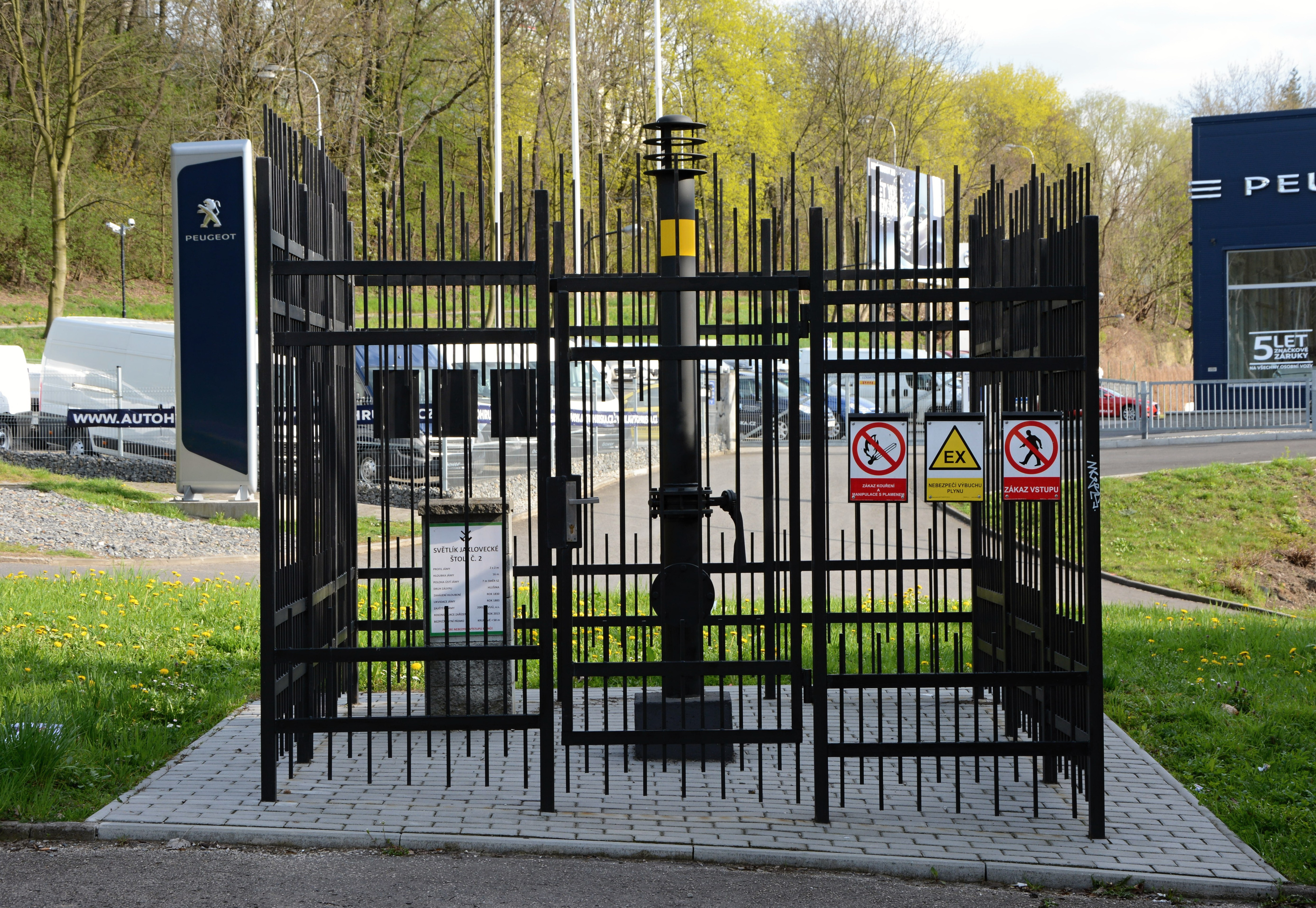 Světlík č. 2 Jaklovecké dědičné štoly, Slezská Ostrava